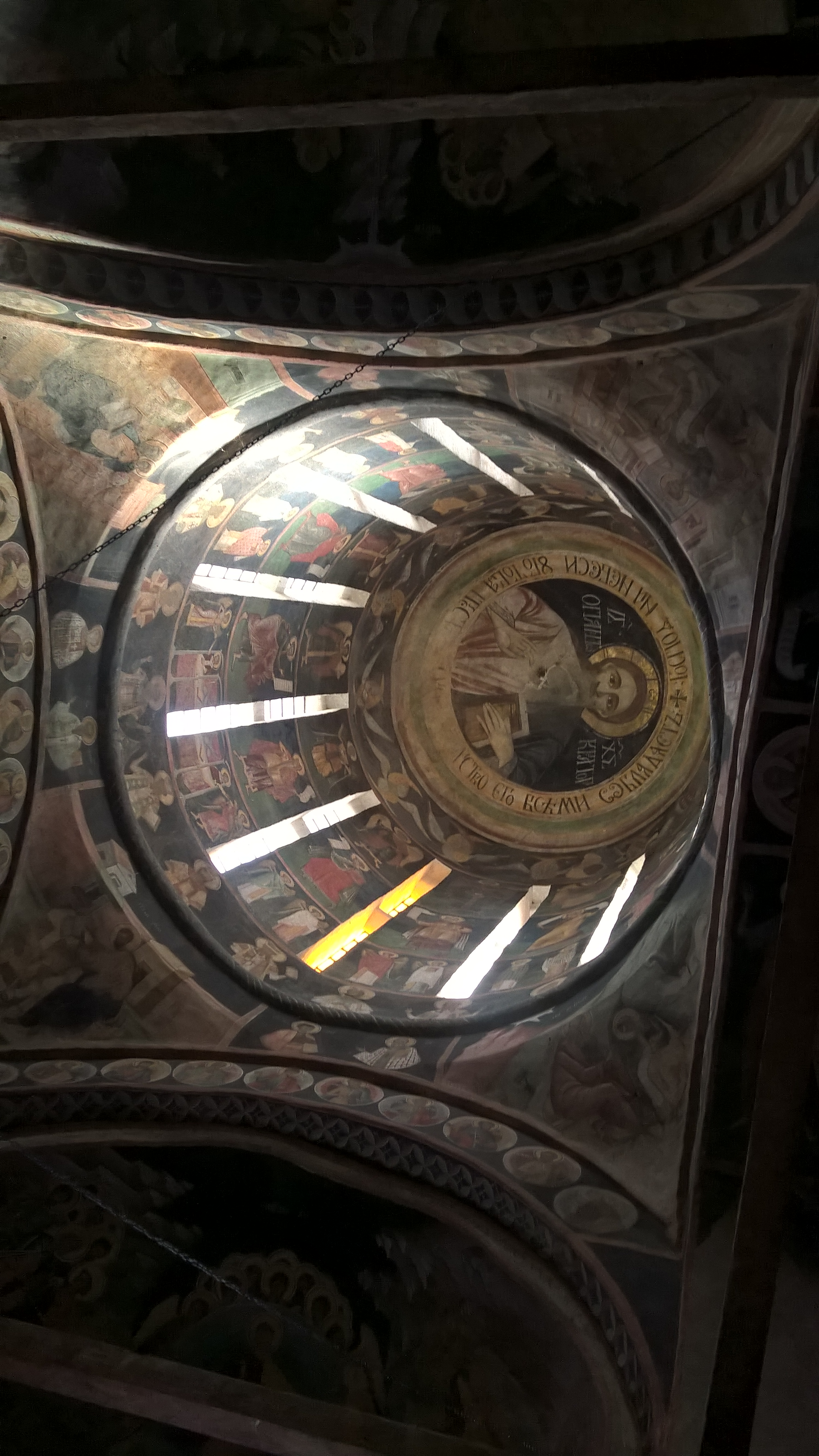 Mănăstirea Călui